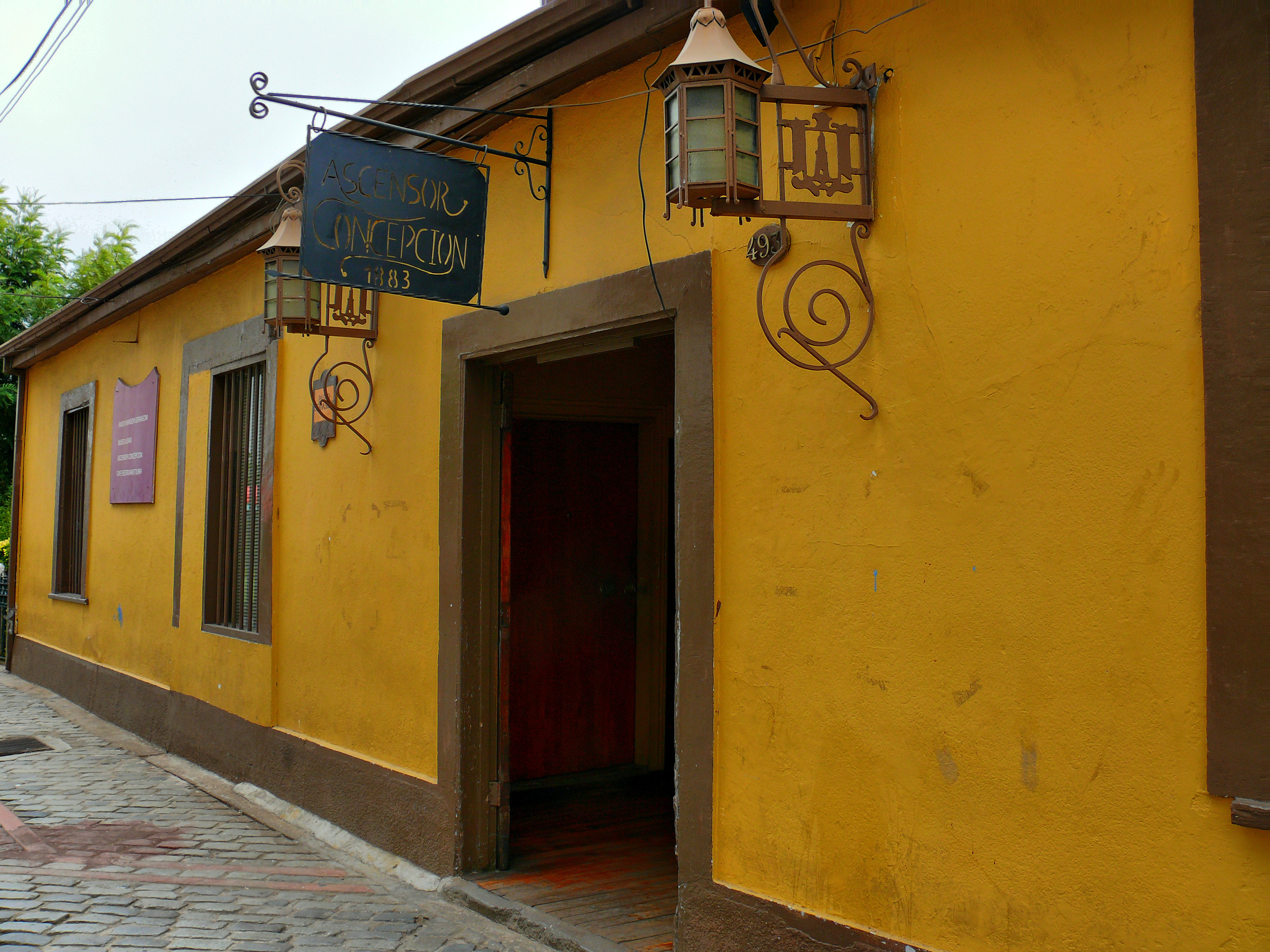 Paseo Gervasoni en Cerro Concepción This is a photo of a national monument in Chile: 606